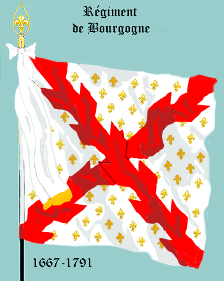 Ordonnanzfahne eines königlich französischen Infanterie-Regiments. - Entnommen und überarbeitet aus: „LES UNIFORMES ET LES DRAPEAUX DE L'ARMÉE DU ROI“ Marseille 1899. (Drapeau d'Ordonnance d' un régiment française d'infanterie royale.)